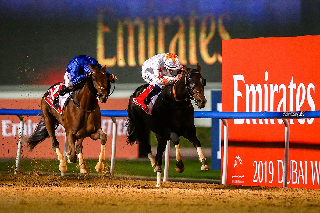 جام جهانی اسب‌دوانی ۲۰۱۹ - دبی